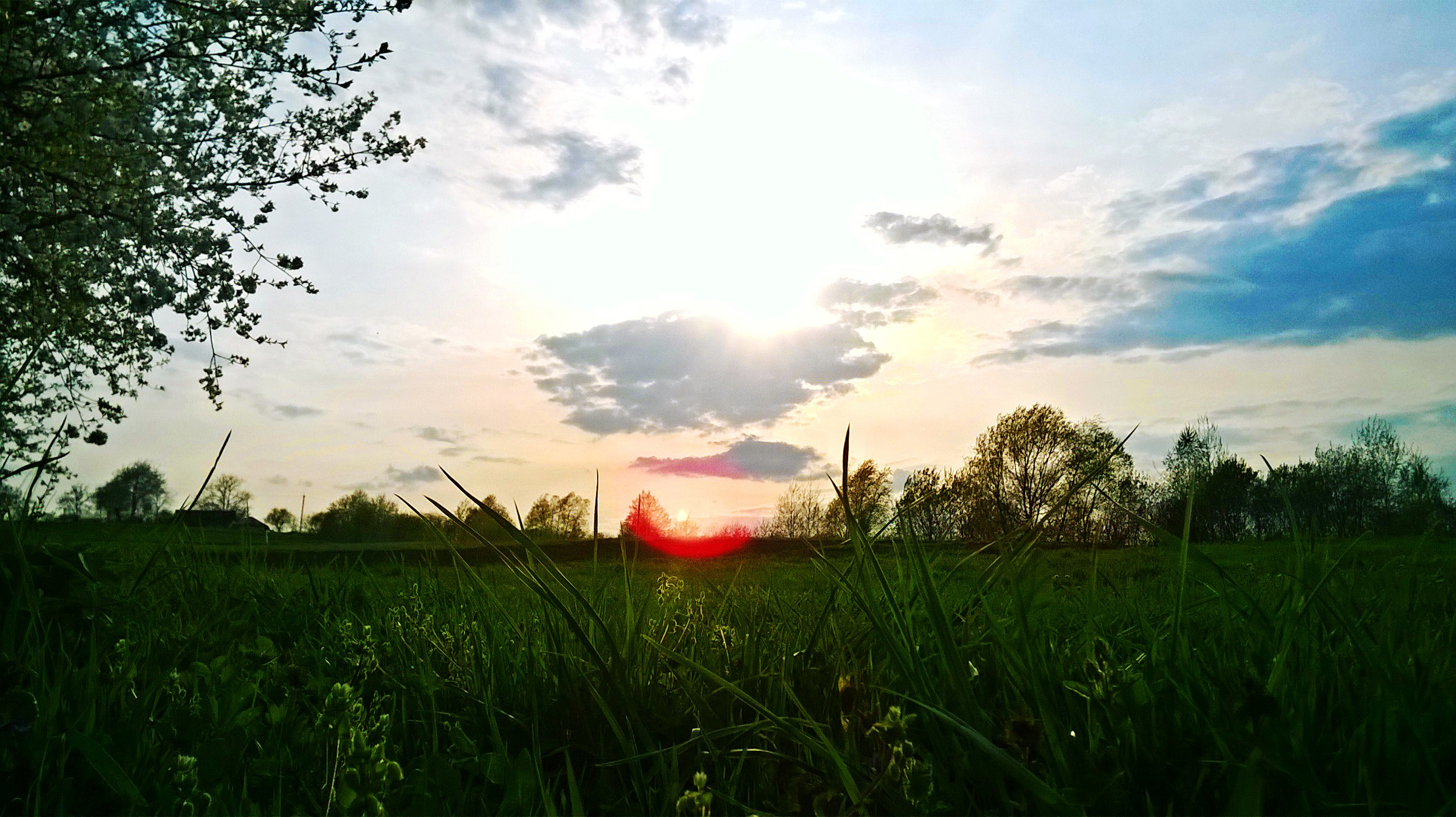 Ну як не милуватись такою красою